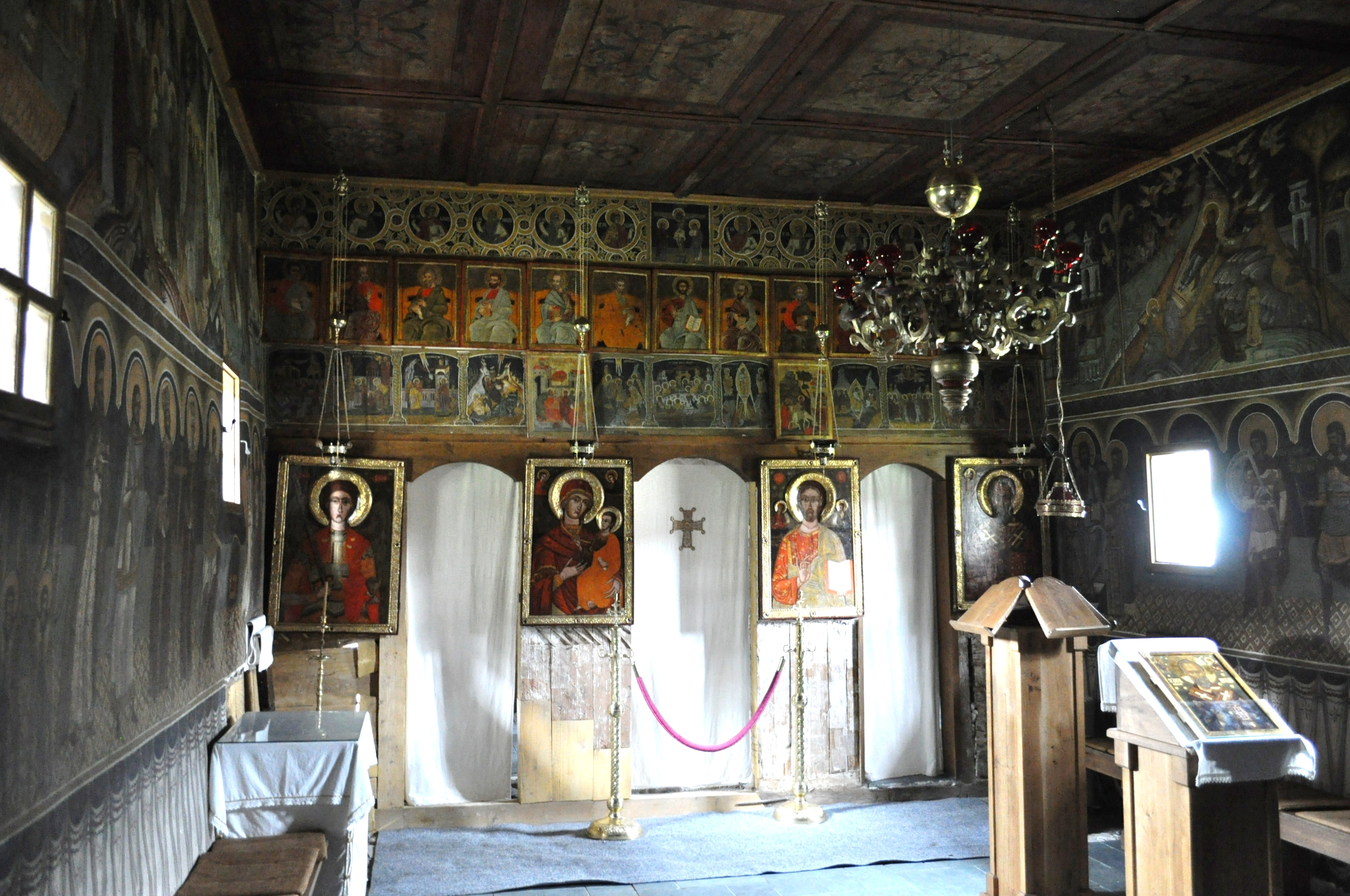 Biserica de lemn "Sf. Nicolae" a mănăstirii Lupşa, sat VALEA LUPŞII; comuna LUPŞA